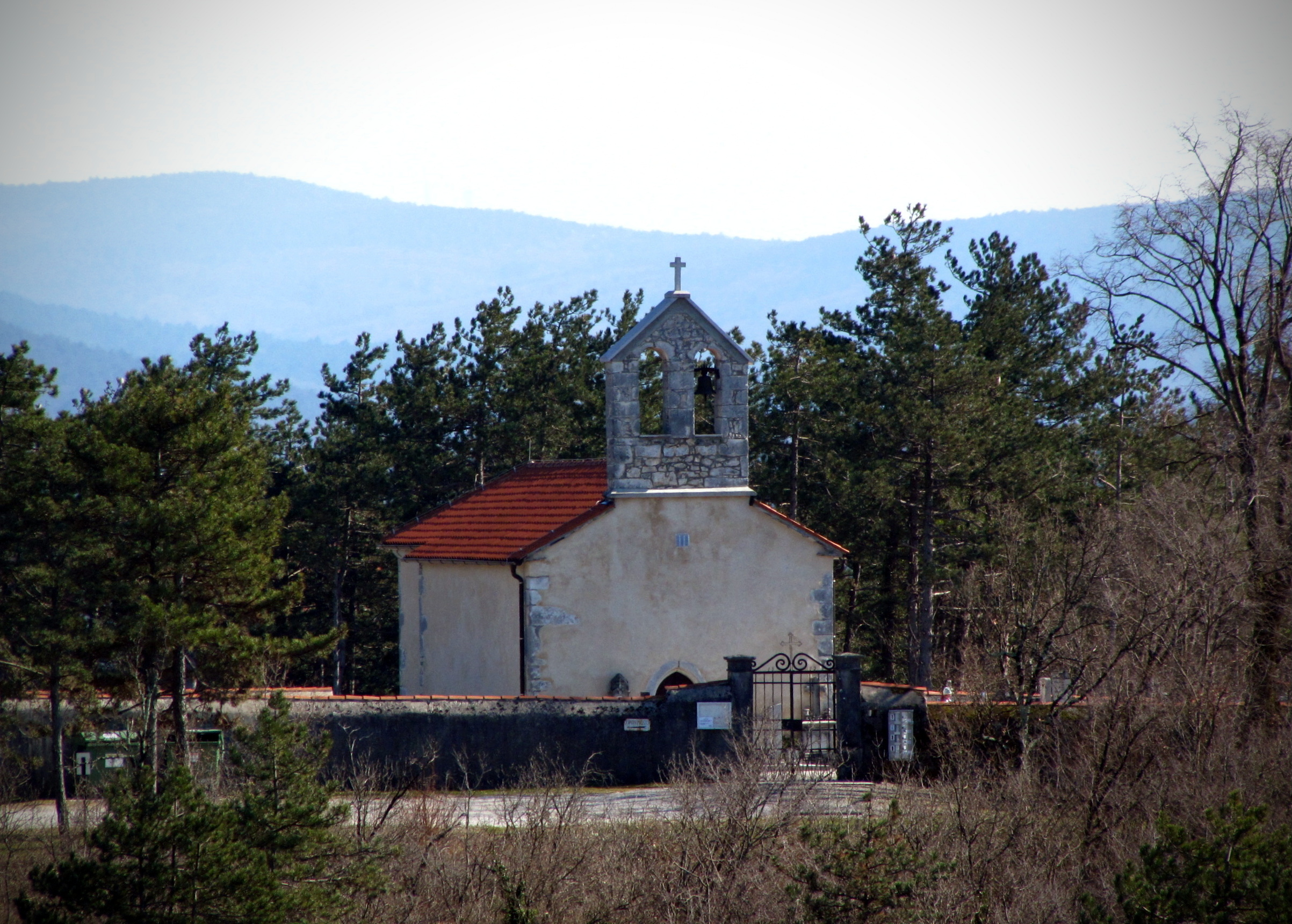 Lipica Open